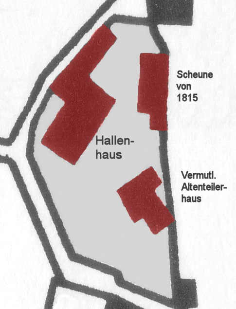 Lageplan von Hof Burzlaff auf Basis einer Katasterkarte von 1870